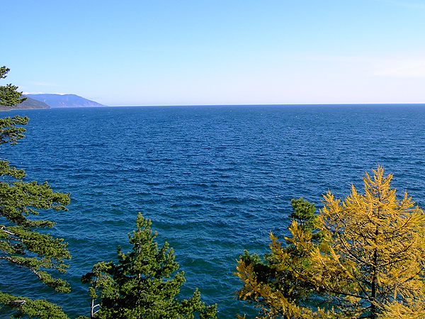 вид с сопки на озеро Байкал